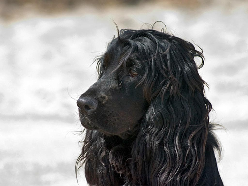 English Cocker Spaniel "Max" Author: Adam Kumiszcza